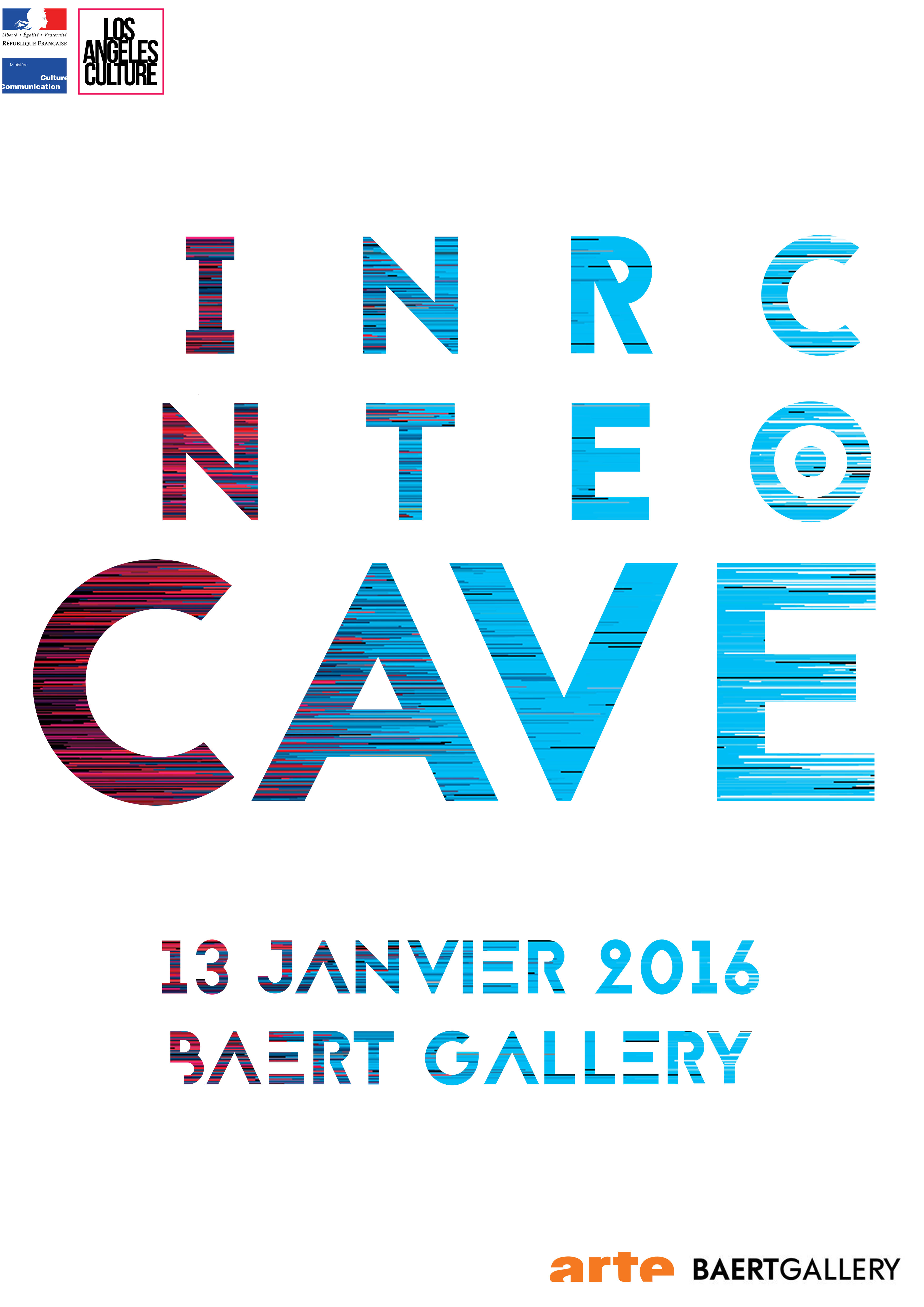 affiche d'éxpositions.